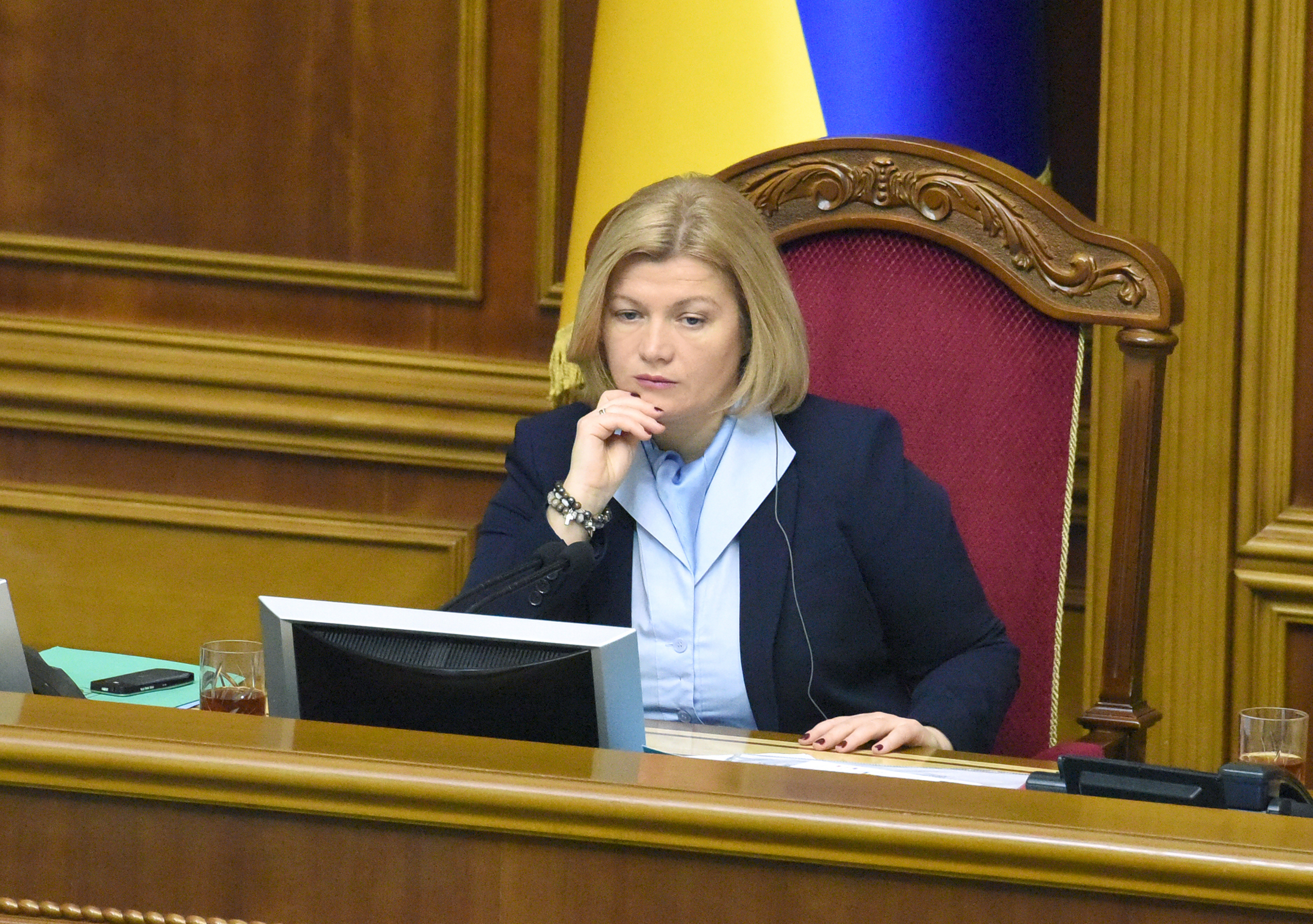 Верховная Рада Украины 2018 год, фото Вадим Чуприна